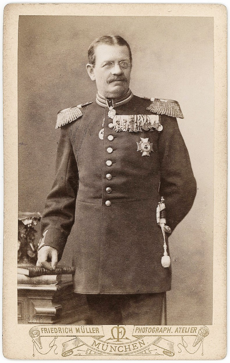 Fotografie von Karl von Lotzbeck